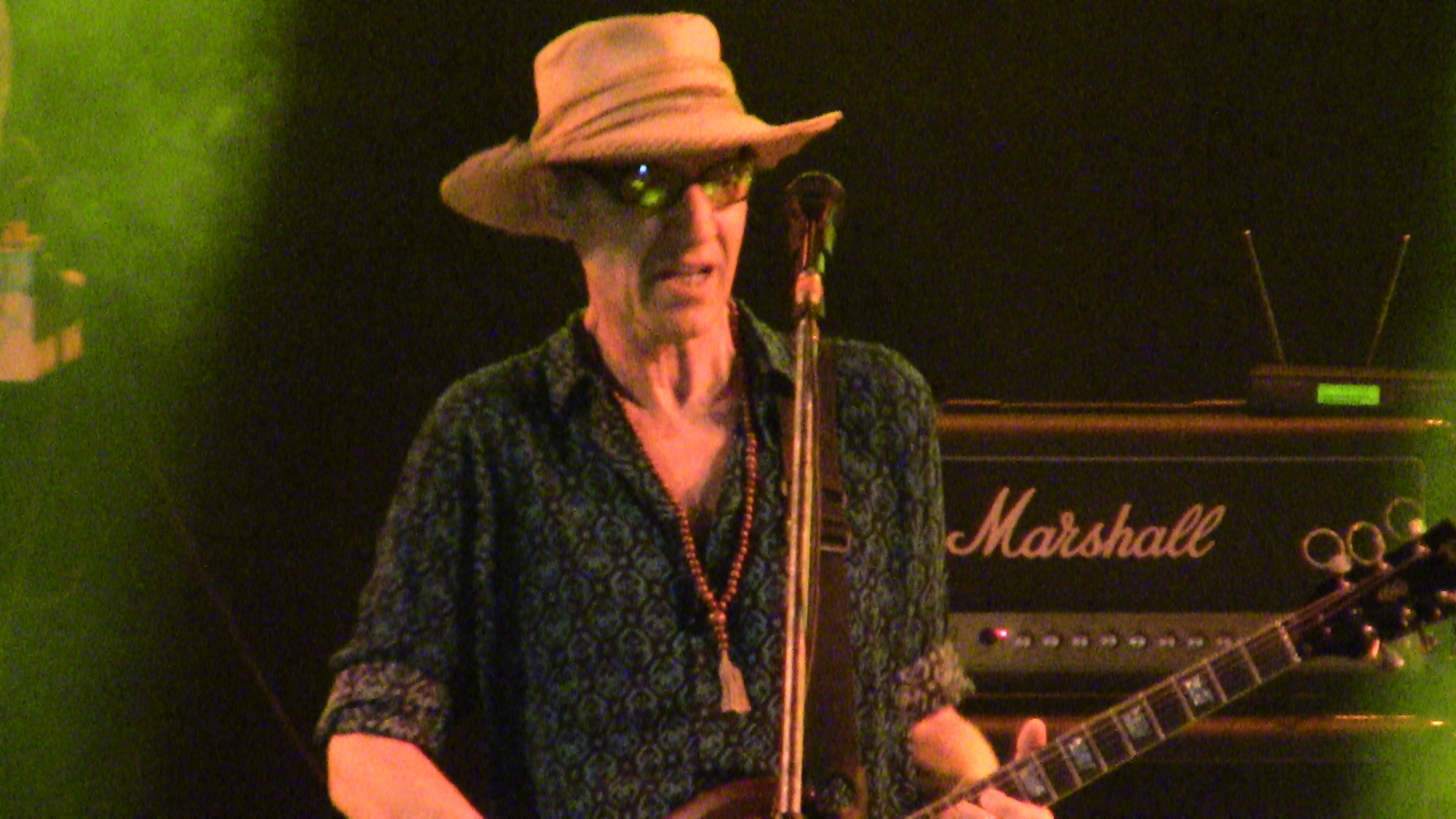 Eduardo "Skay" Beilinson, guitarrista y vocalista argentino, durante un show en 2017.